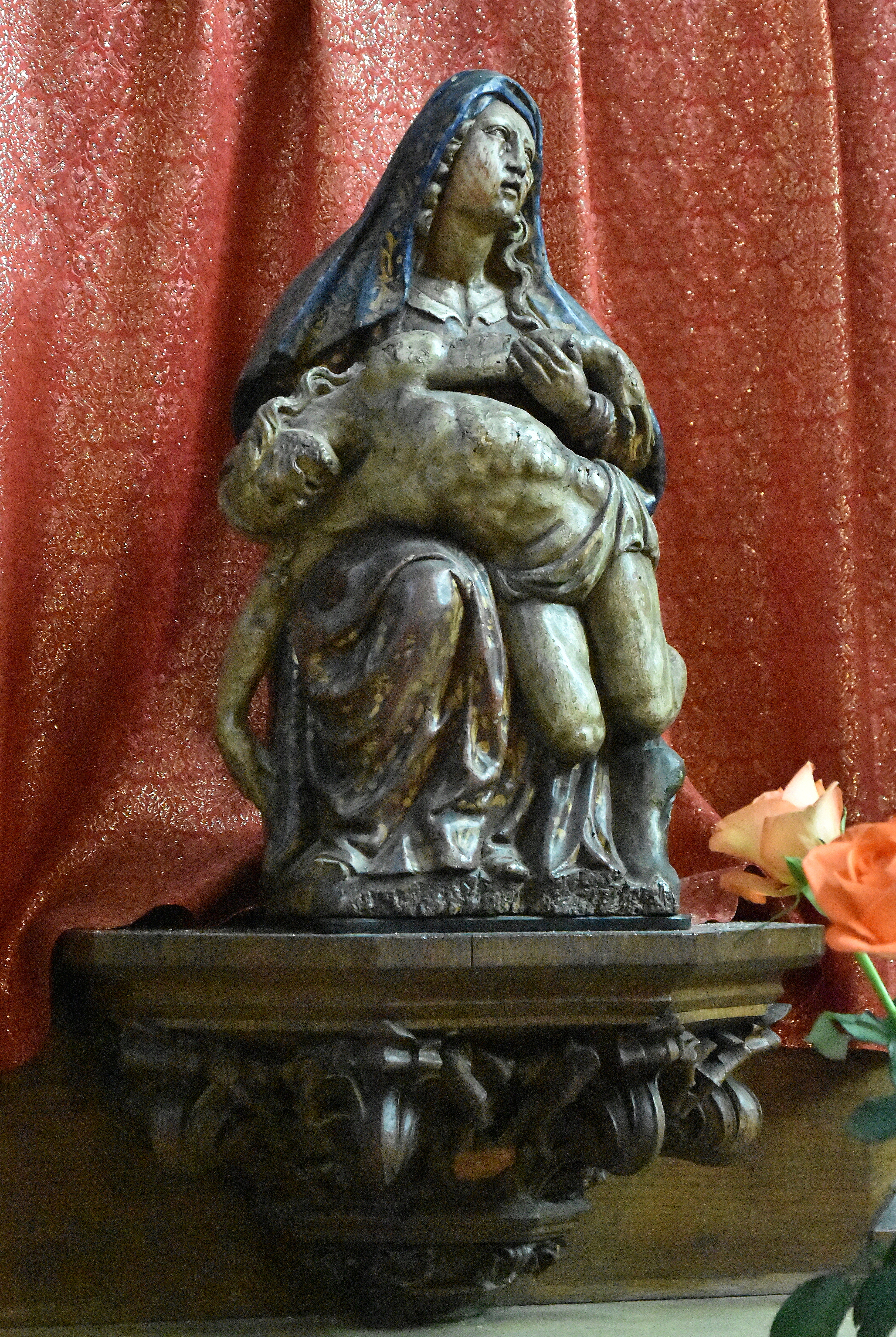 Jean de Bloc (14e eeuw) Nood Gods - Heilige Kerstkerk Gent 22-06-2019 This photo of movable heritage has been taken in the Flemish Region